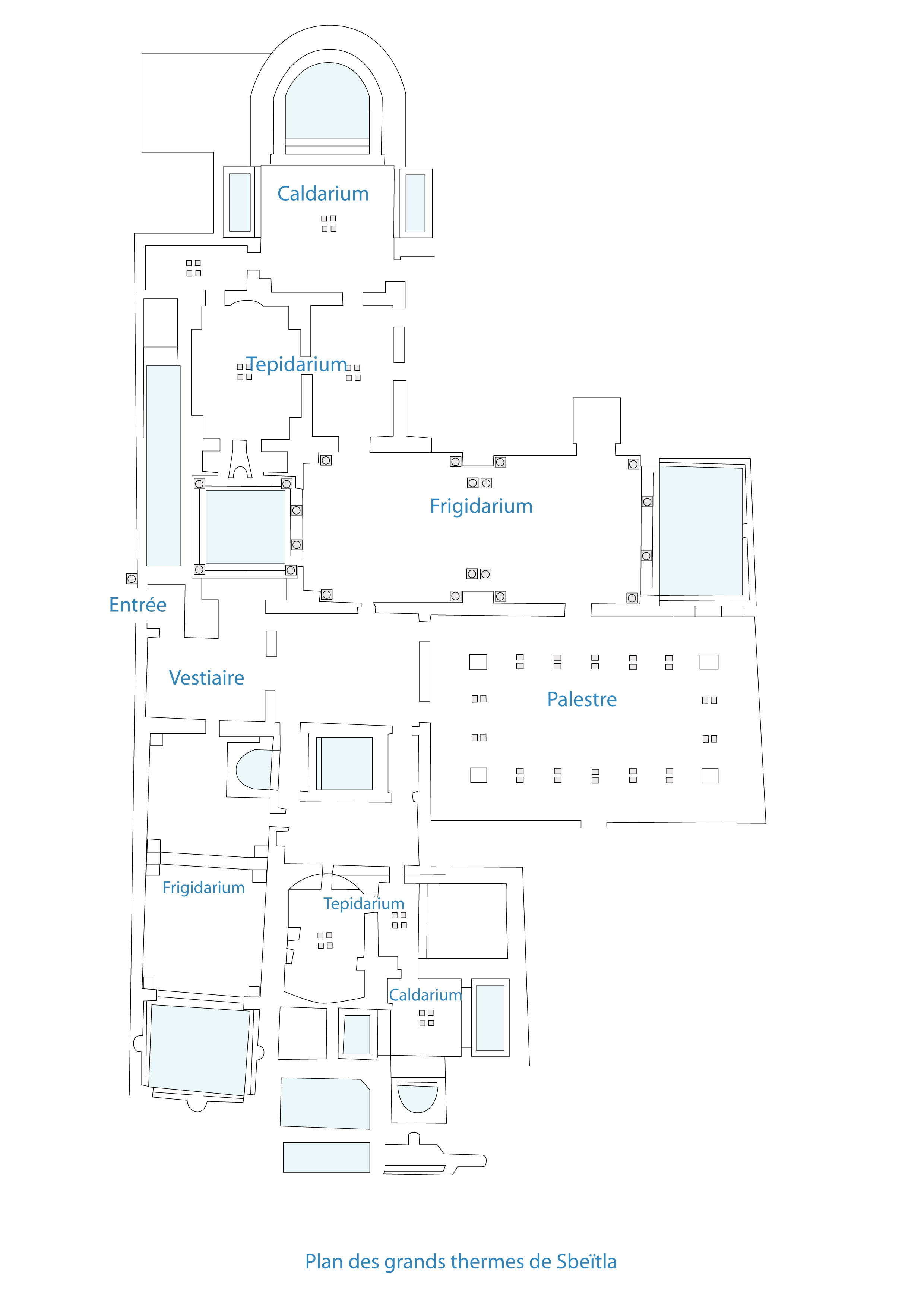 Tunisie, plan des grandes thermes de Sbeïtla